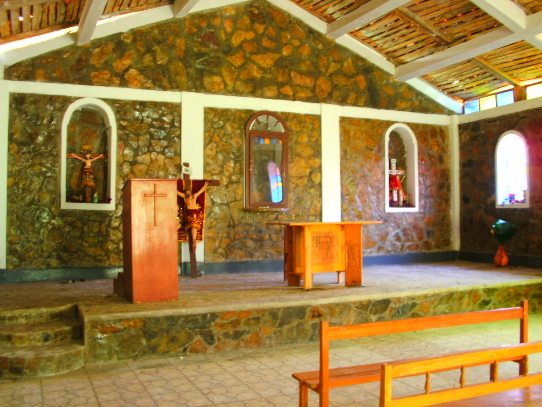 Esta capilla ha sido construida en el presente siglo. Chuyas es famoso por sus peregrinajes que se realizaron en el siglo XX a la fiesta de la Santísima Trinidad.